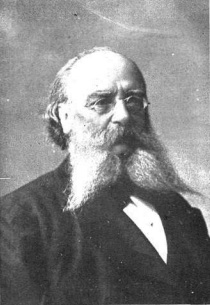 D. José Mª Esquerdo. candidato republicano. Obra del fotógrafo Manuel Compañy.